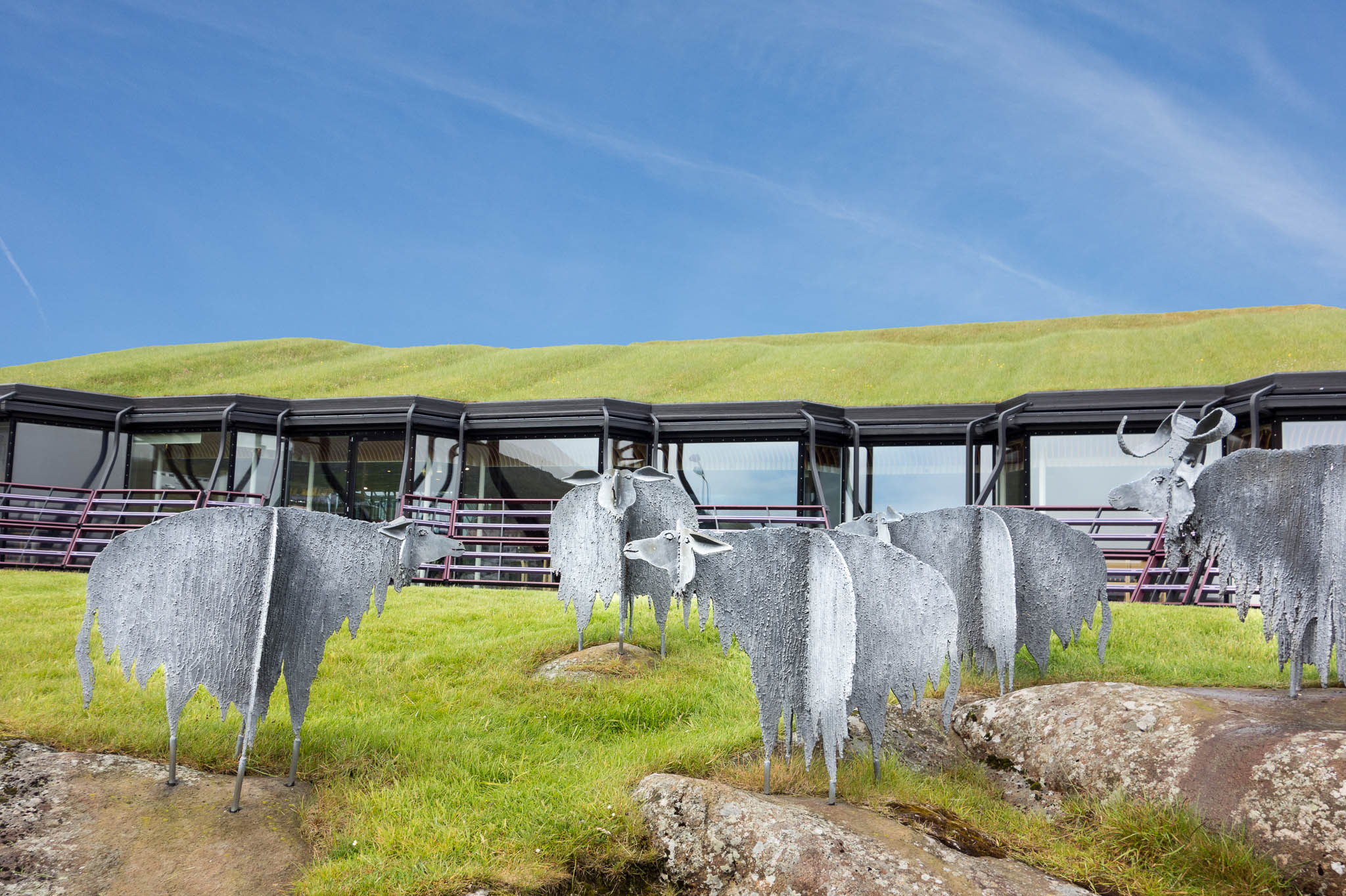 Nordens hus 2014